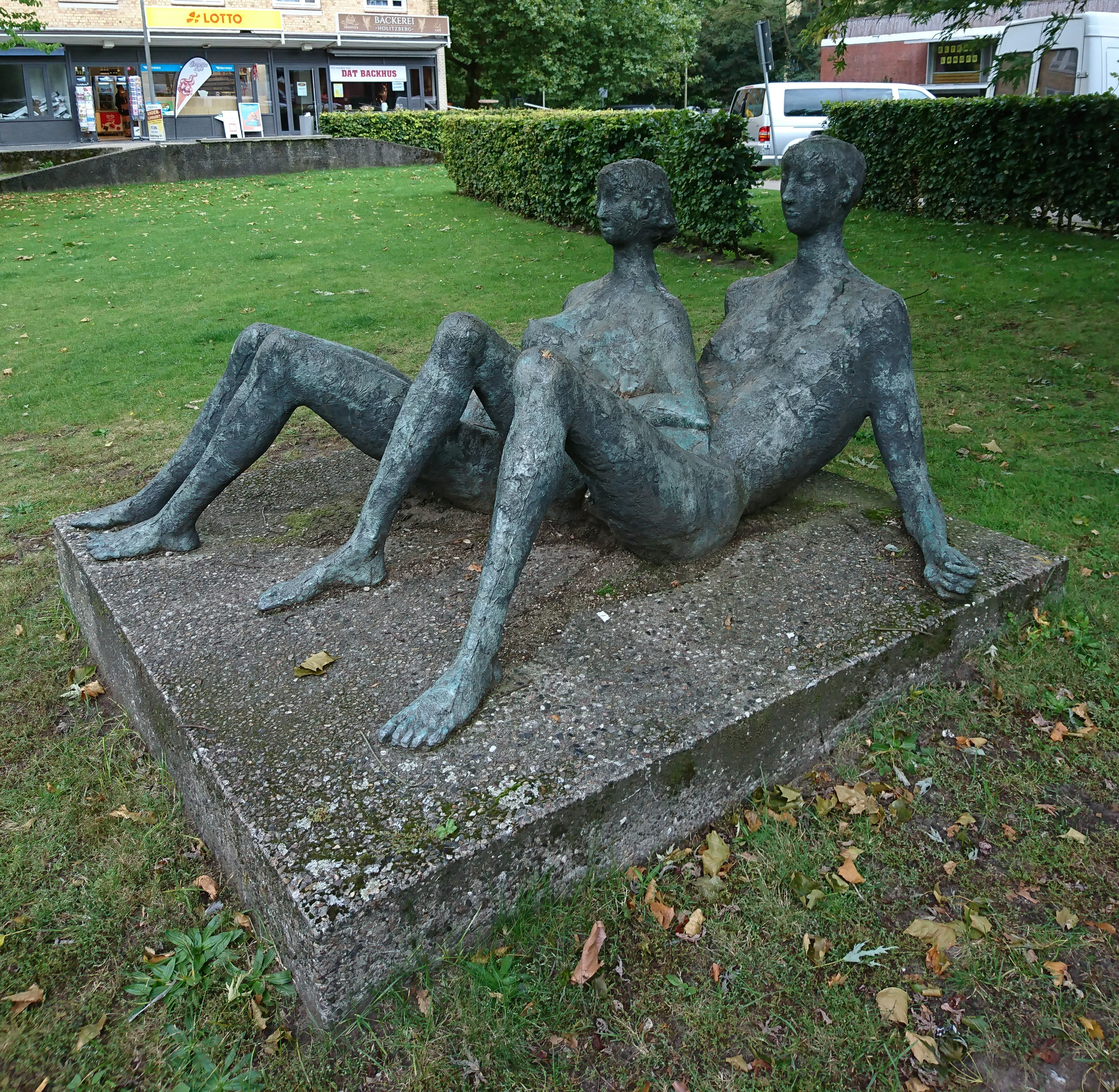 Bronzeskulptur Liegendes Paar von Ursula Querner, aufgestellt 1966, Holitzberg 298 in Hamburg-Langenhorn. Eigentümer: Siemers-Stiftung